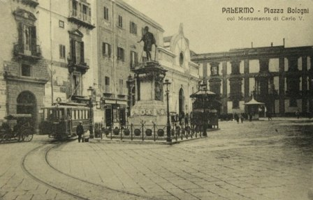 Palermo, capolinea tranviario di piazza Bologni